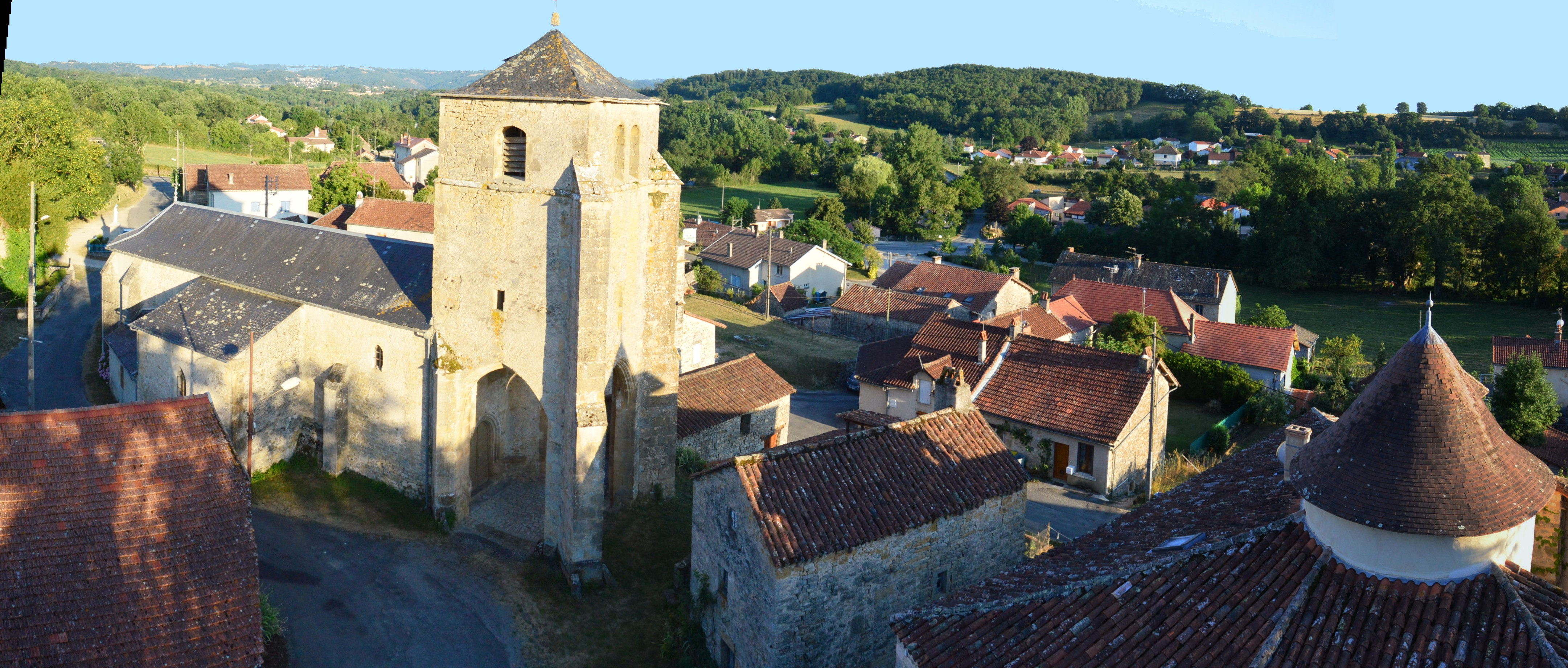 vue panoramique de Toulonjac